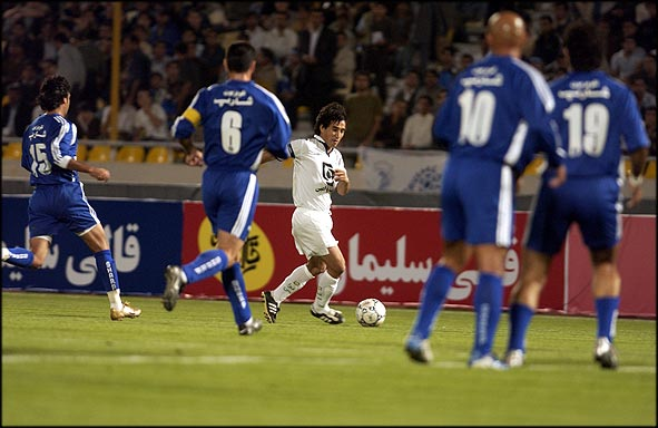 استقلال با دوگل سامره به پرسپولیس سلام كرد